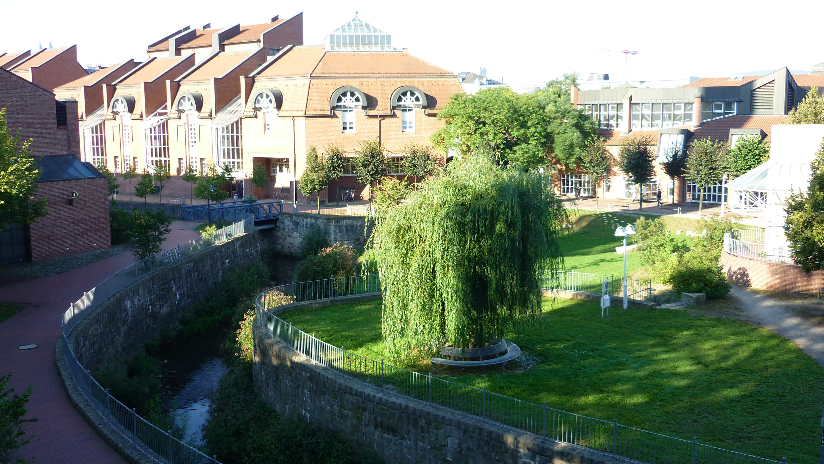 Universität Kassel - Blick auf die Zentralmensa (Campus am HoPla)